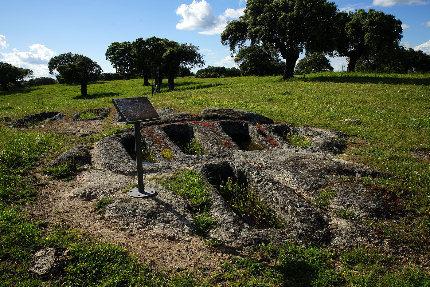 Necrópolis visigoda, Arroyo de la Luz, provincia de Cáceres, España.